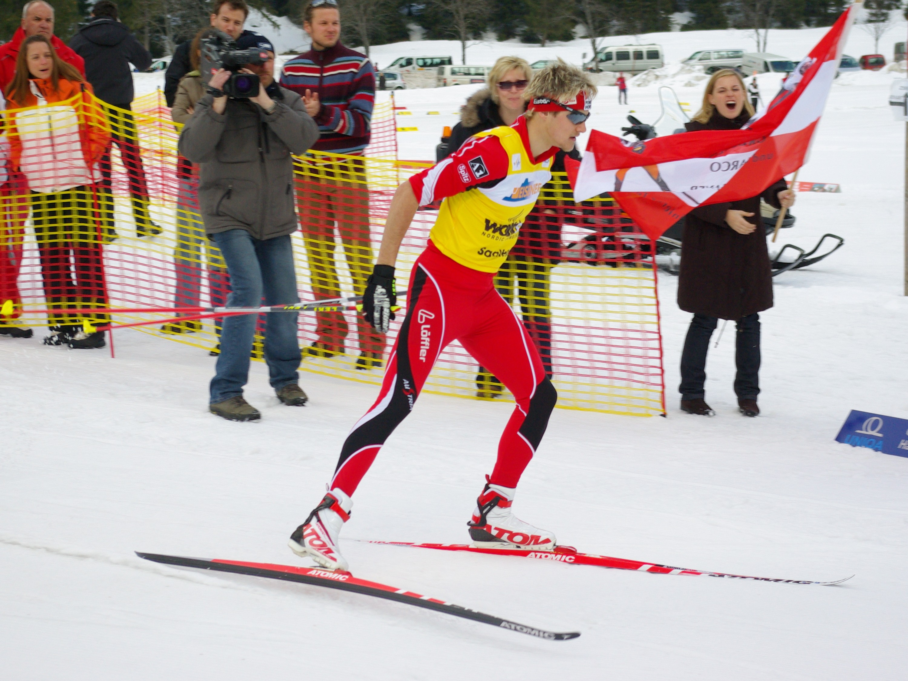 Der österreichische Nordische Kombinierer Marco Pichlmayer während des Langlaufs des Sprint-Bewerbes im B-Weltcup in Eisenerz, Österreich am 9. März 2008.